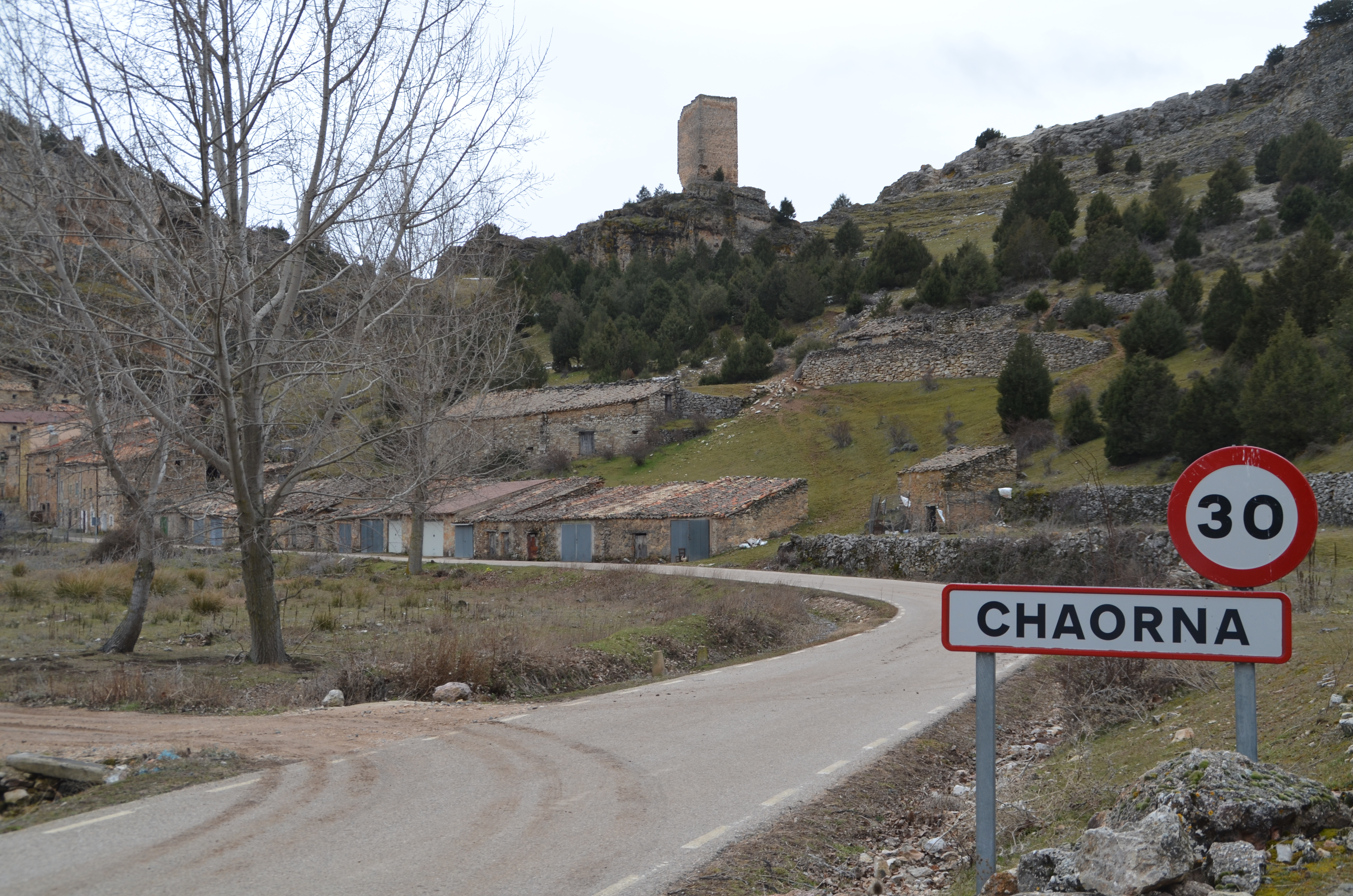 La localidad de Chaorna (Arcos de Jalón, Soria, España) es muy pintoresca y se encuentra encajonada en la Hoz del río Useca.